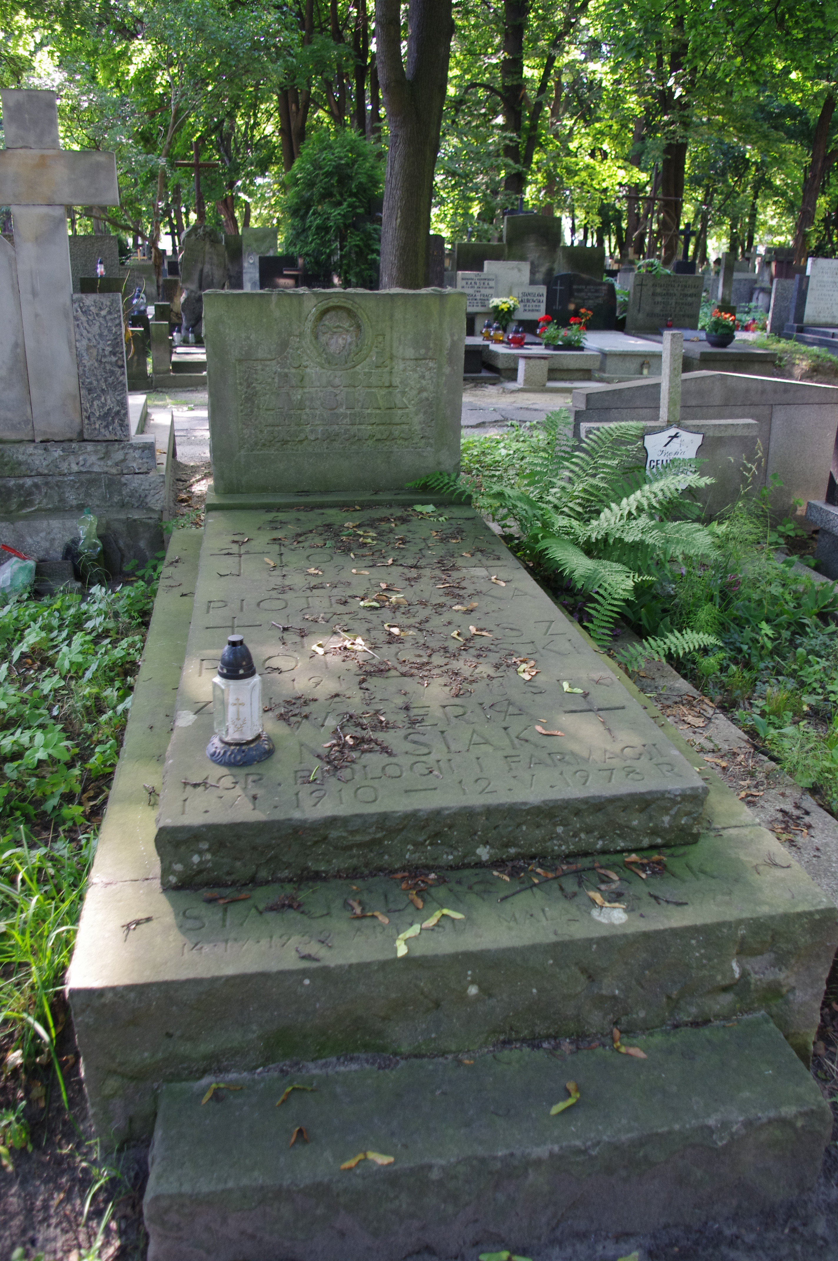 Grób rzeźbiarza Franciszka Masiaka na Starych Powązkach w Warszawie